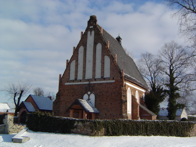 Kościół w Dębowej Łęce